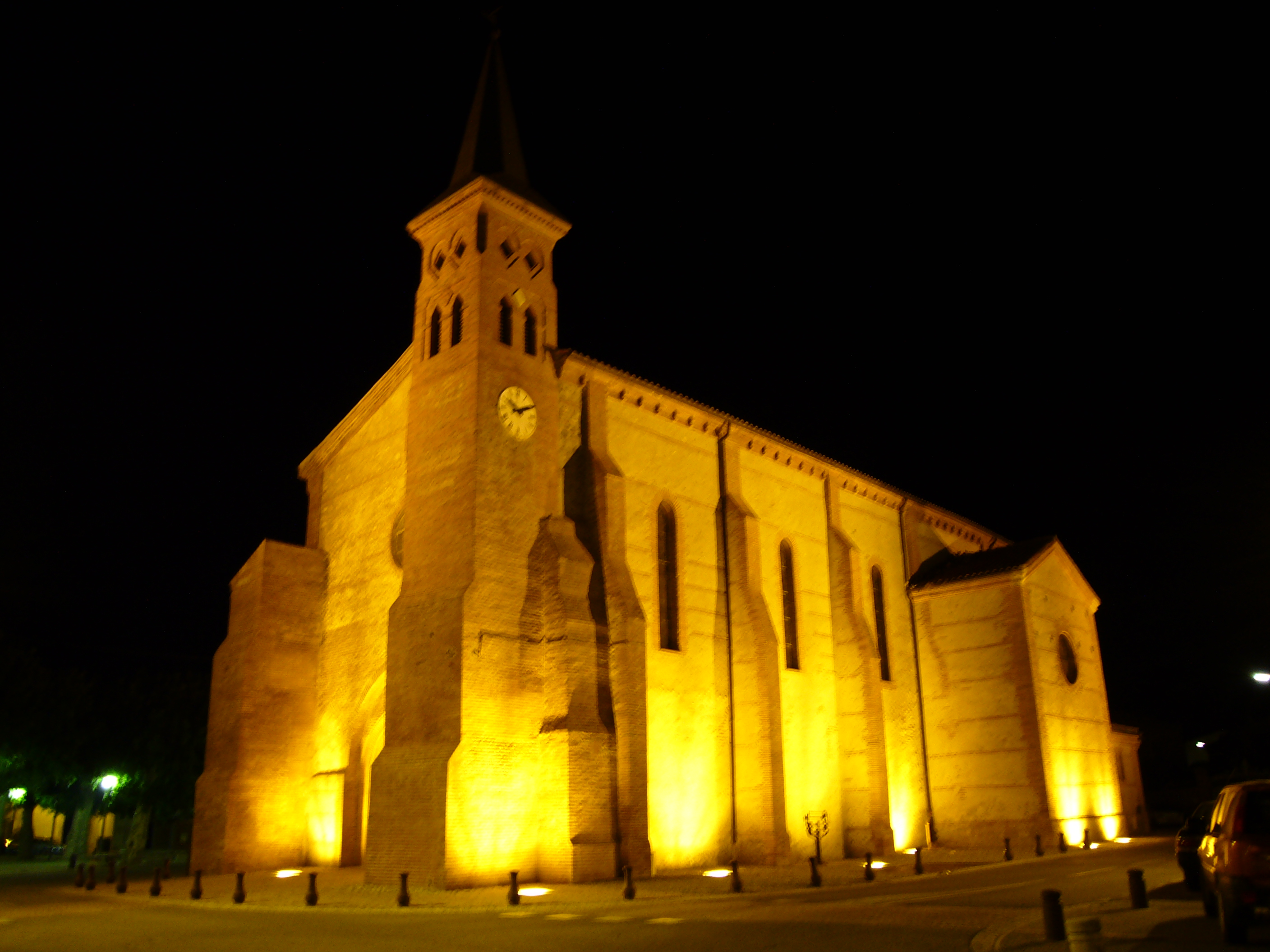 Église de La Tour-du-Crieu, en Ariège, France